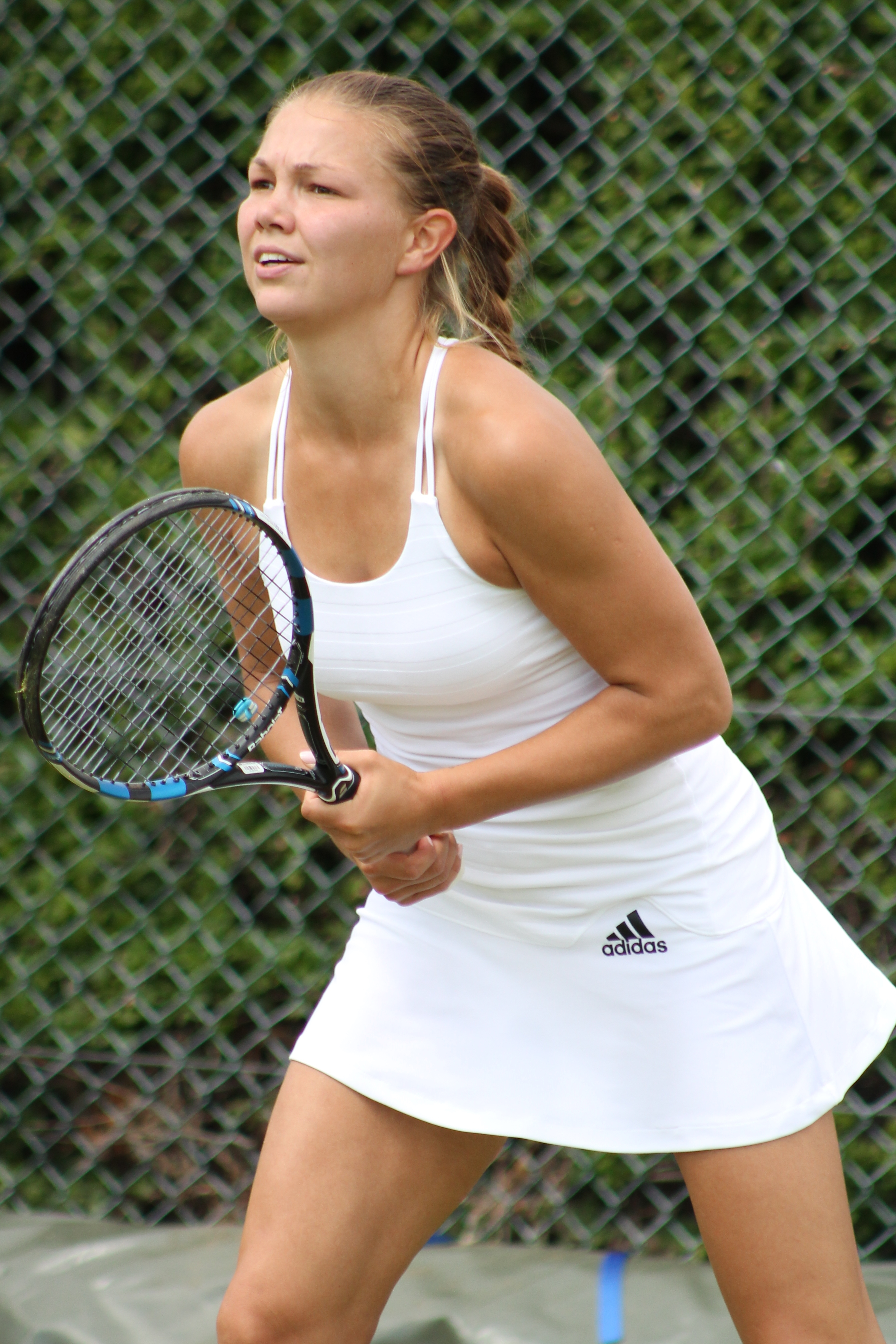 Melnikova WMQ15 (4)